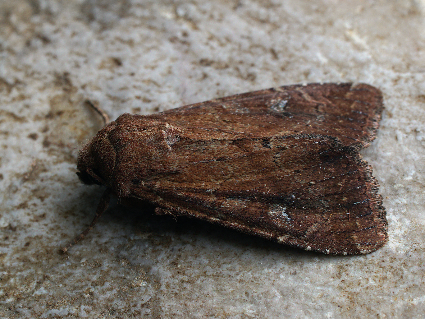 Exemplar found: Russia, Moscow Oblast, Odintsovsky District, near village Pestovo, 04.07.2018, by light МО, Одинцовский р-н, окрестности деревни Пестово, 04.07.2018, на свет